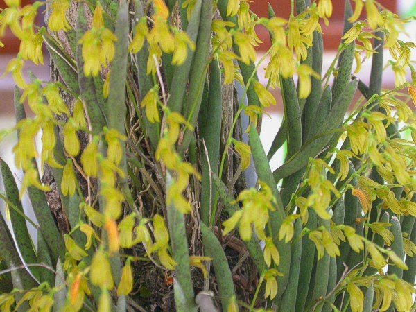 Still needing new combination in Acianthera. Kew has as Pleurothallis